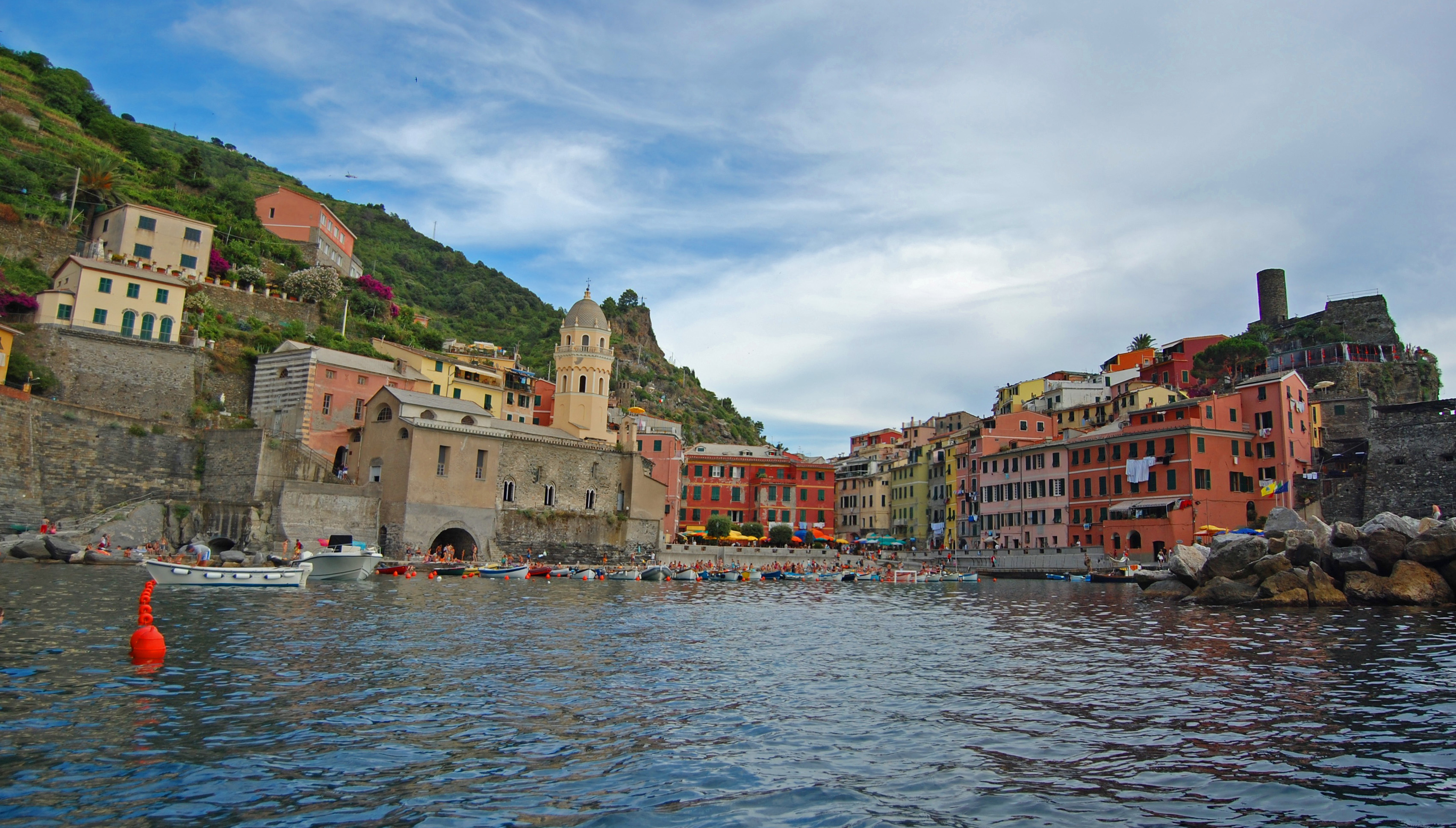 Vernazza dalla barca